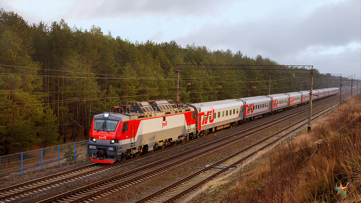 Электровоз ЭП20-015 с фирменным поездом «Буревестник» на станции Жолнино